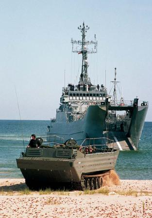 ORP Poznań (projektu 767, typu Lublin) podczas wysadzania desantu.Okręt transportowo-minowy (projekt 767 typ LUBLIN) powstał w Stoczni Północnej w Gdańsku (5 okretów w serii według kolejności budowy-ORP Lublin, ORP Gniezno, ORP Kraków, ORP Poznań, ORP Toruń). Okręty przeznaczone do załadunku i wyładunku sprzetu technicznego i sił desantu z nieprzygotowanego brzegu oraz do stawiania zagród minowych przy wykorzystaniu różnych wariantów pojemności minowej.